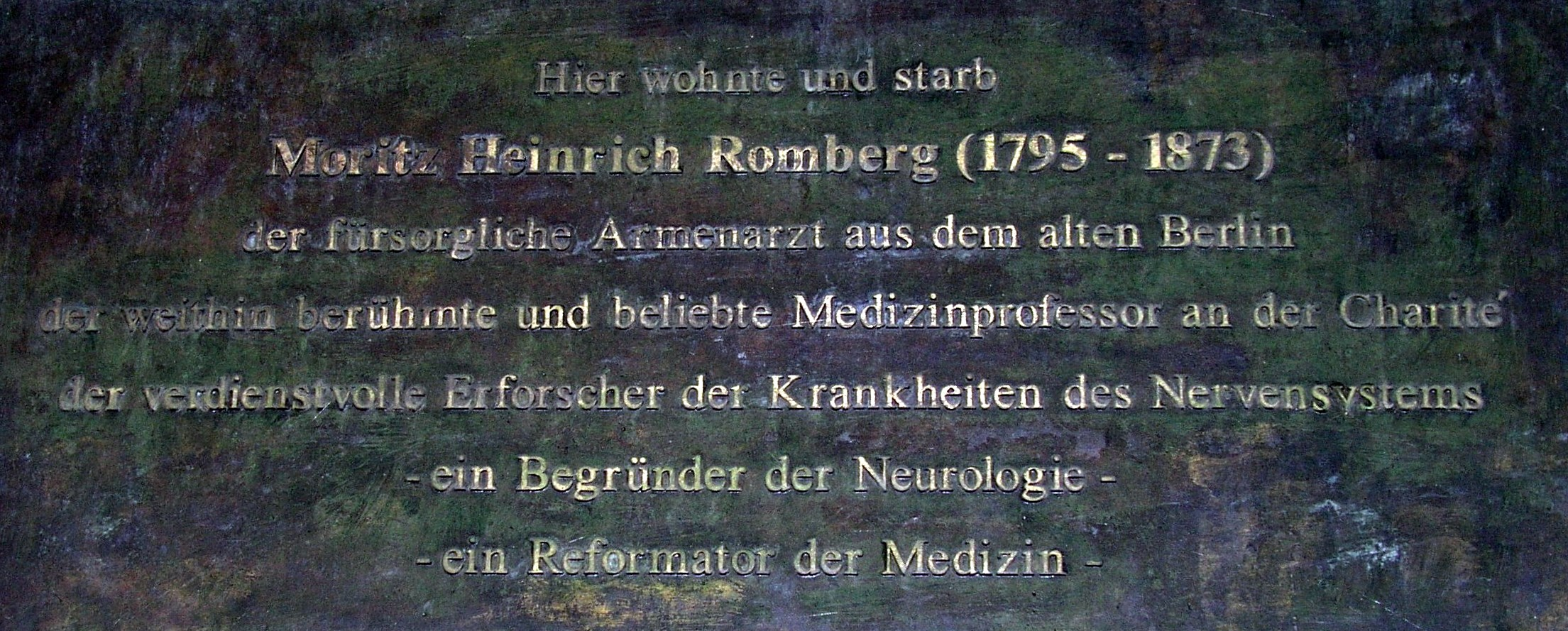 Gedenktafel für Moritz Heinrich Romberg in Berlin-Mitte